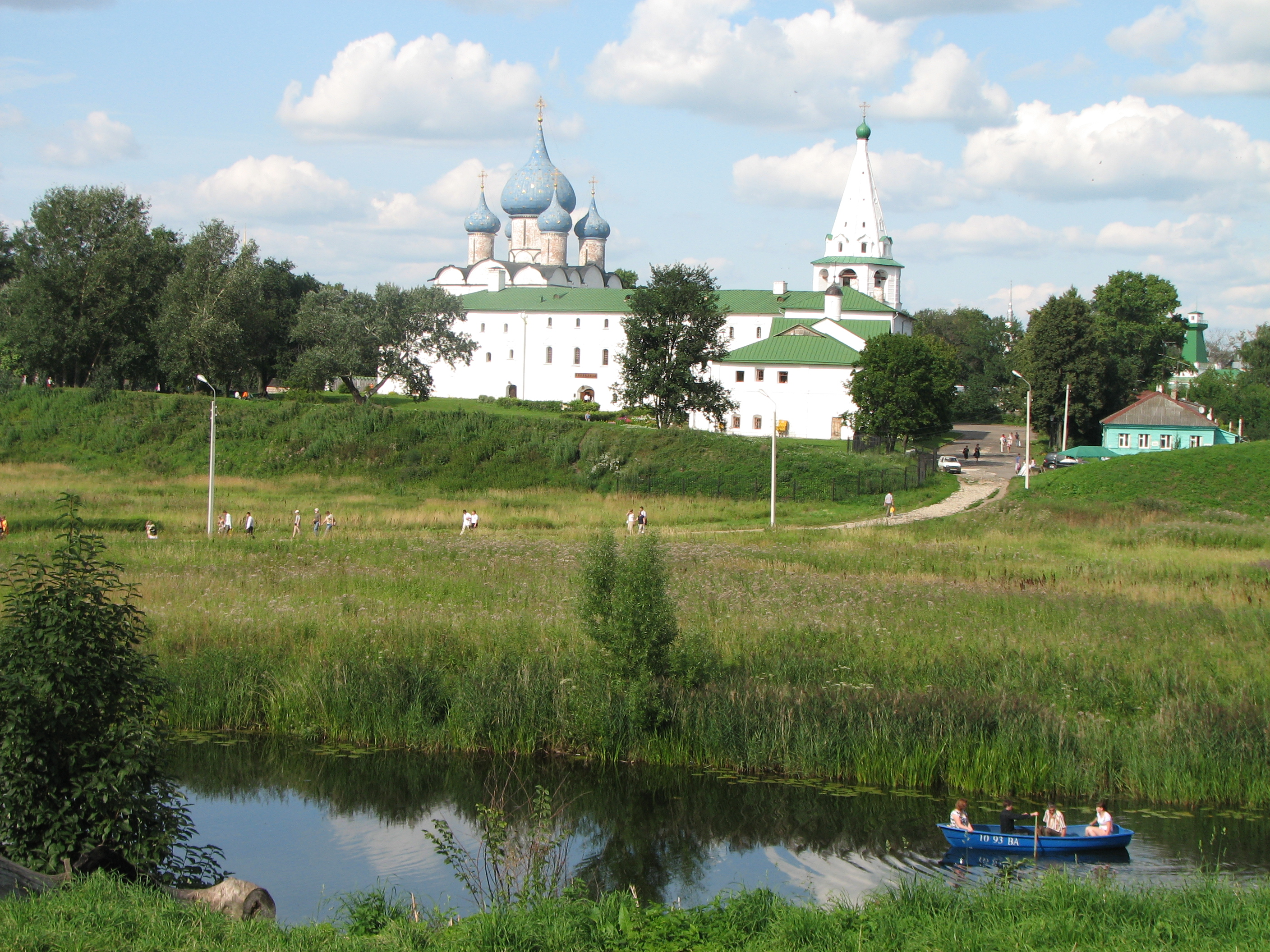 Вид г.Суздаля Владимирской области. Август, 2009 год.